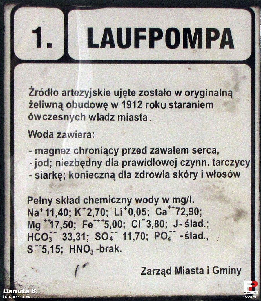 Tabliczka umieszczona przez władze miasta obok pompy. W Międzychodzie jest więcej takich informacji dla turystów. Tabliczki z opisem umieszczone są na ścianach ciekawych kamienic, ulic. Plus dla samorządowców! A woda ze studni bardzo pyszna.